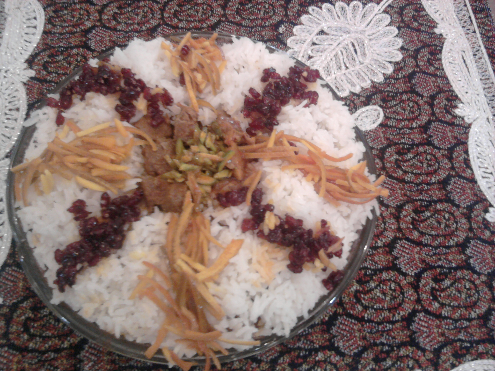 قیمه نثار ، معروف ترین غذای سنتی شهر قزوین